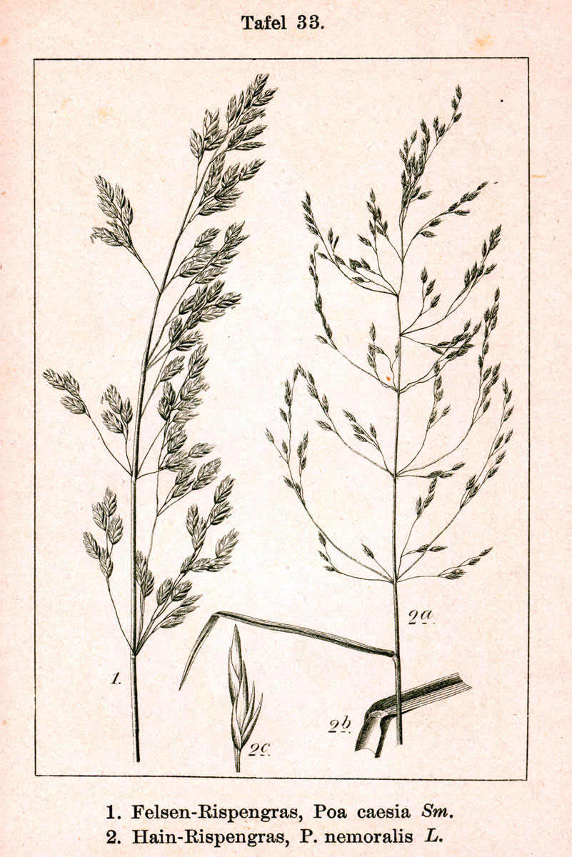 1. Poa glauca Vahl var. glauca, syn. Poa caesia Sm. Original Description 1. Felsen-Rispengras, Poa caesia Sm.2. Hain-Rispengras, Poa nemoralis L.